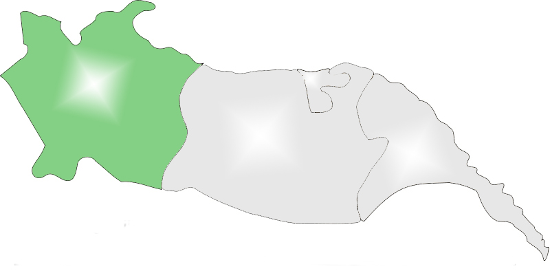 kendim yaptım